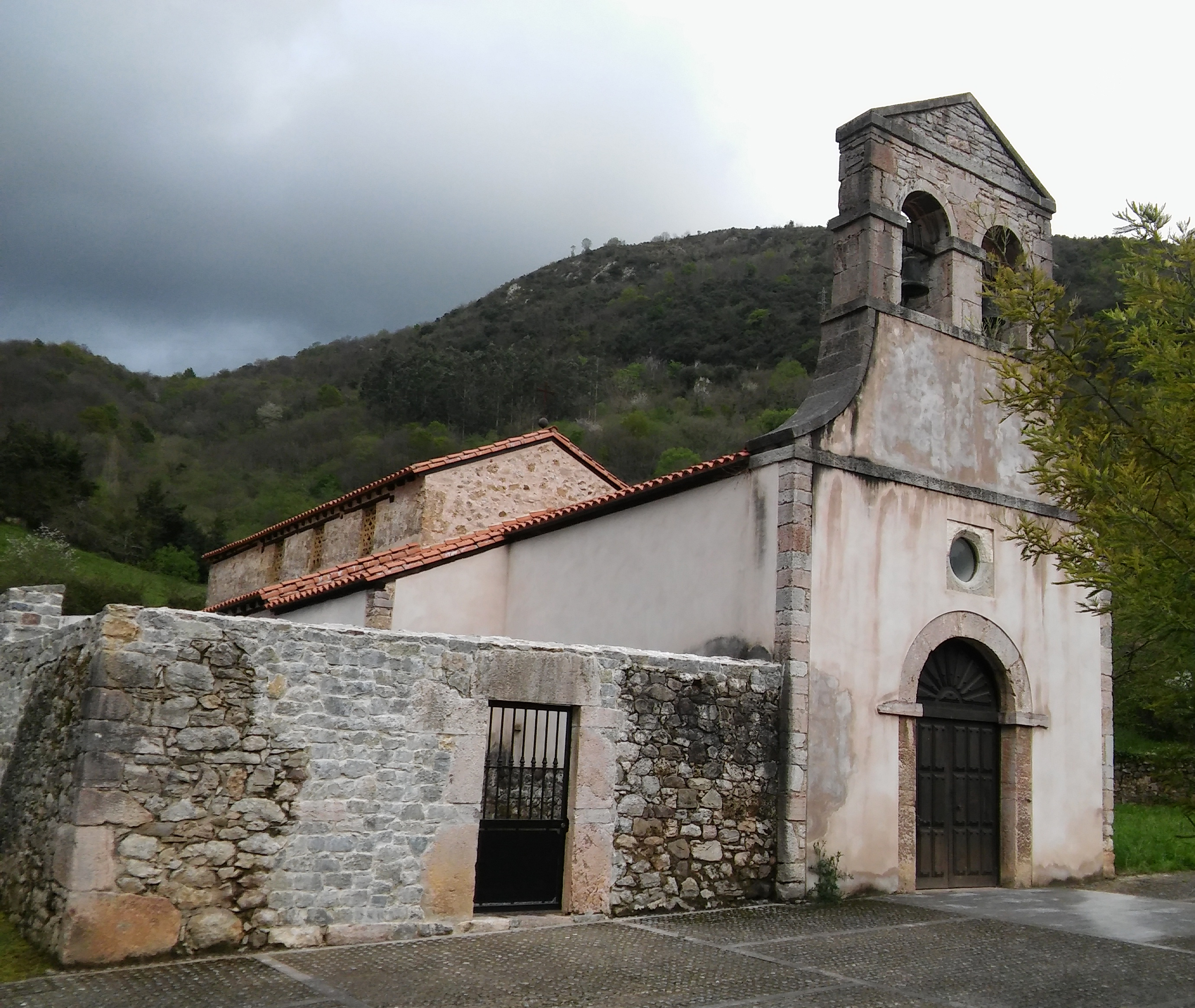 Iglesia prerrománica fundada en el año 891, durante el reinado de Alfonso III.